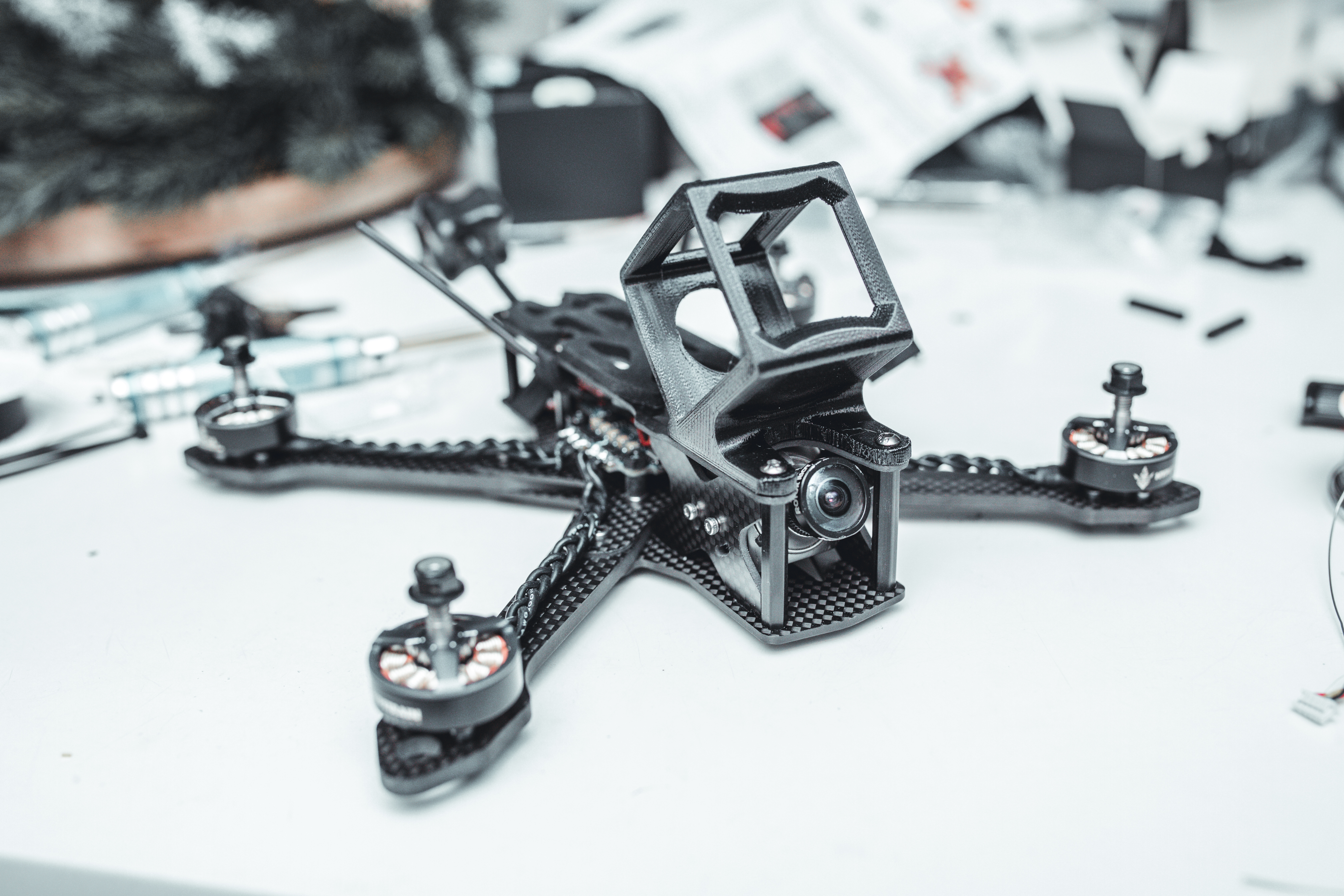 Kleiner FPV Race Quadrocopter mit FPV Ausstattung